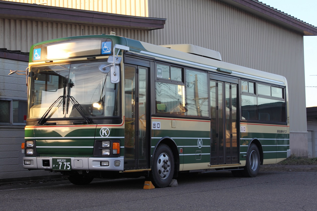 元松戸新京成バスの転入車 頸城自動車本体の旧塗装を復刻している